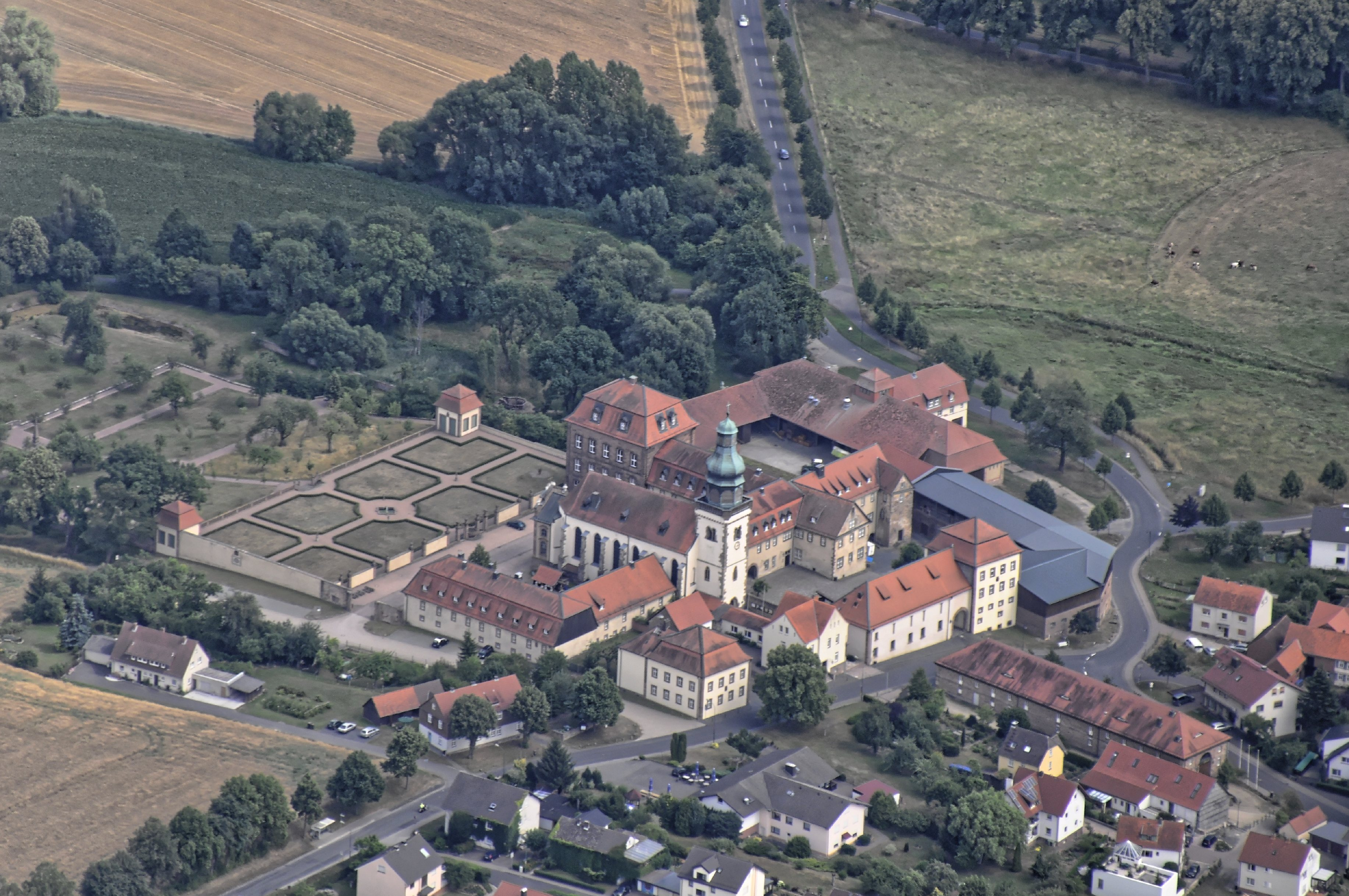 Bilder vom Flug Nordholz-Hammelburg 2015: Die ehemalige Propstei Johannesberg.